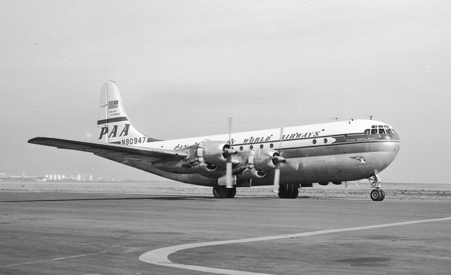 PAA377taxiN90947